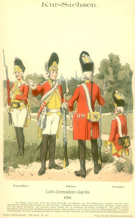 Иллюстрация Рихарда Кнотеля